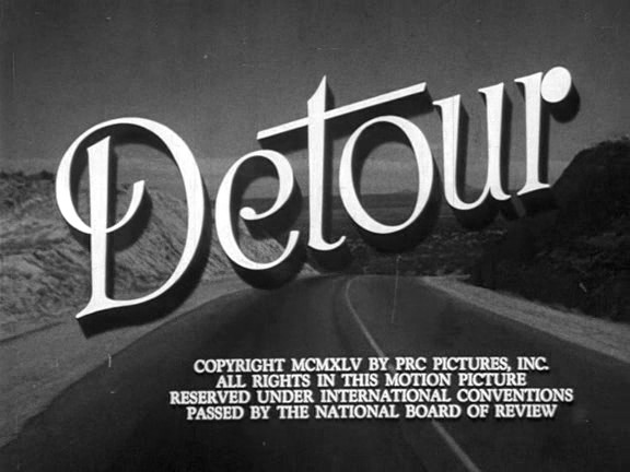 carton titre du film Detour